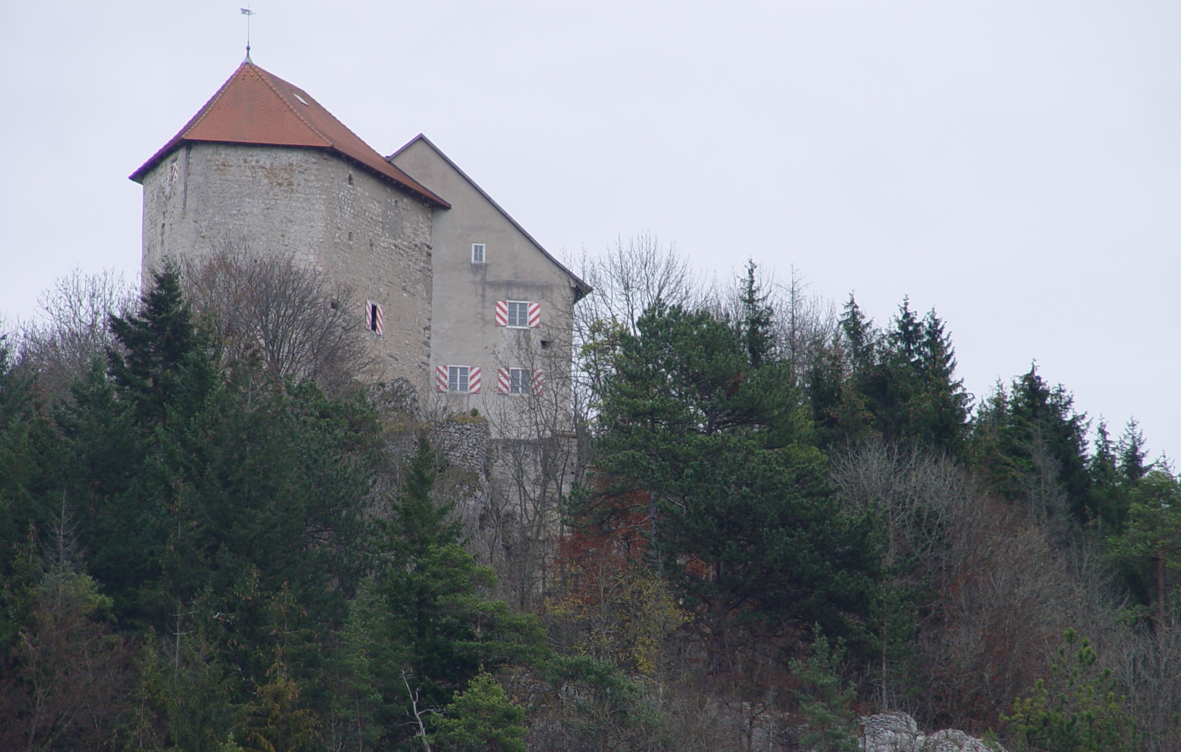 Bild selbst gemacht - own work